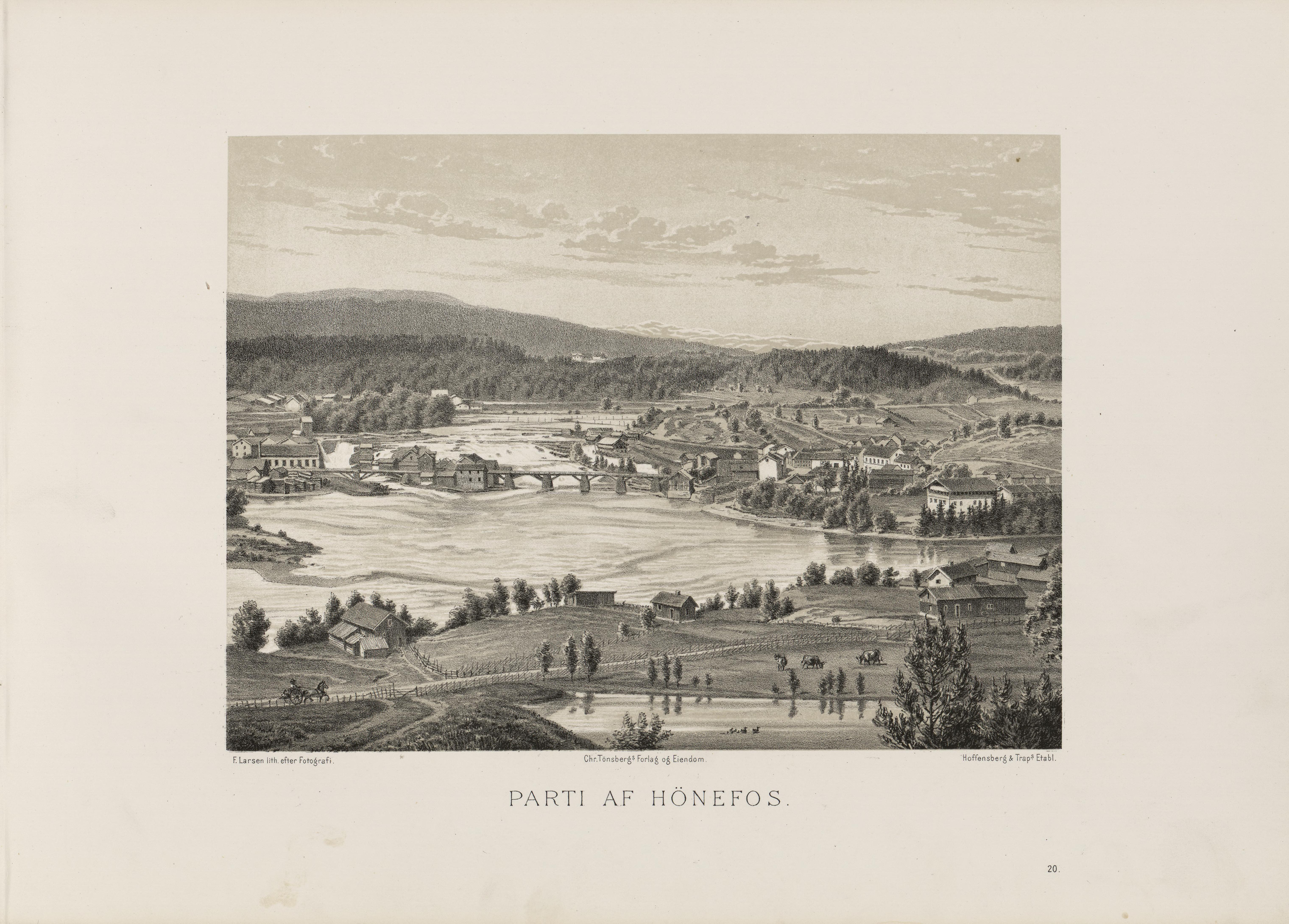 Illustrasjon hentet fra boken "Norge fremstillet i Tegninger" av ukjent forfatter og utgitt av Chr. Tønsberg (no, 1889)